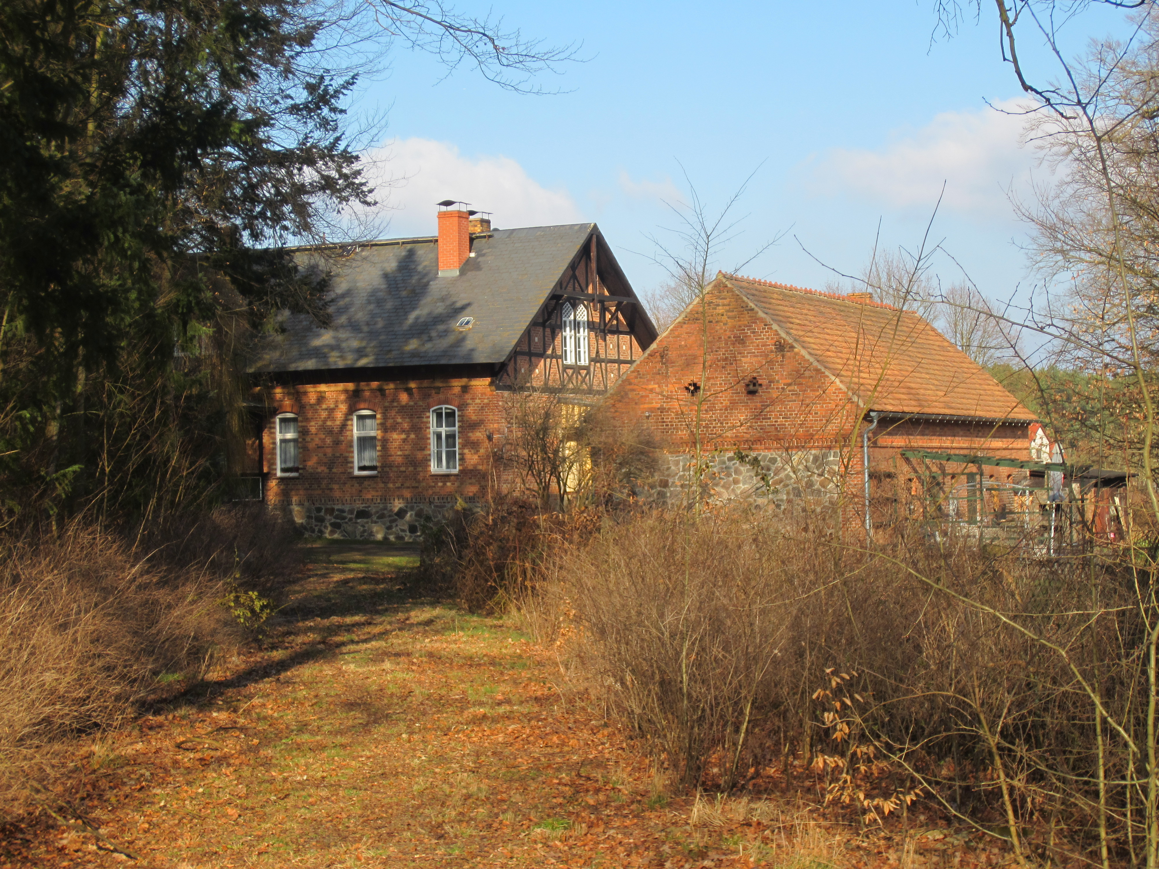 Babben, Gemeinde Massen-Niederlausitz, denkmalgeschützte Försterei (ehemaliges Vorwerk).